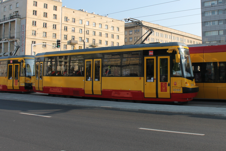 Tramwaj 123N-2144 na ul. Marszałkowskiej w Warszawie.